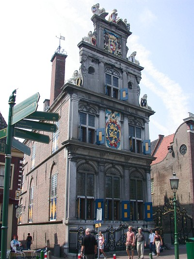 Zelf gemaakt, toestemming voor gebruik op Wikipedia Categorie:Afbeelding Hoorn (Noord-Holland)